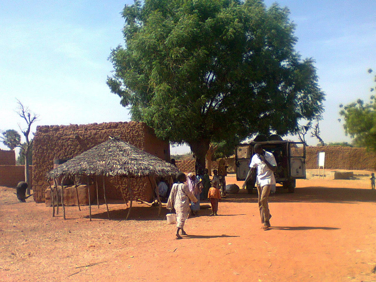 a village in Kaita, Nigeria